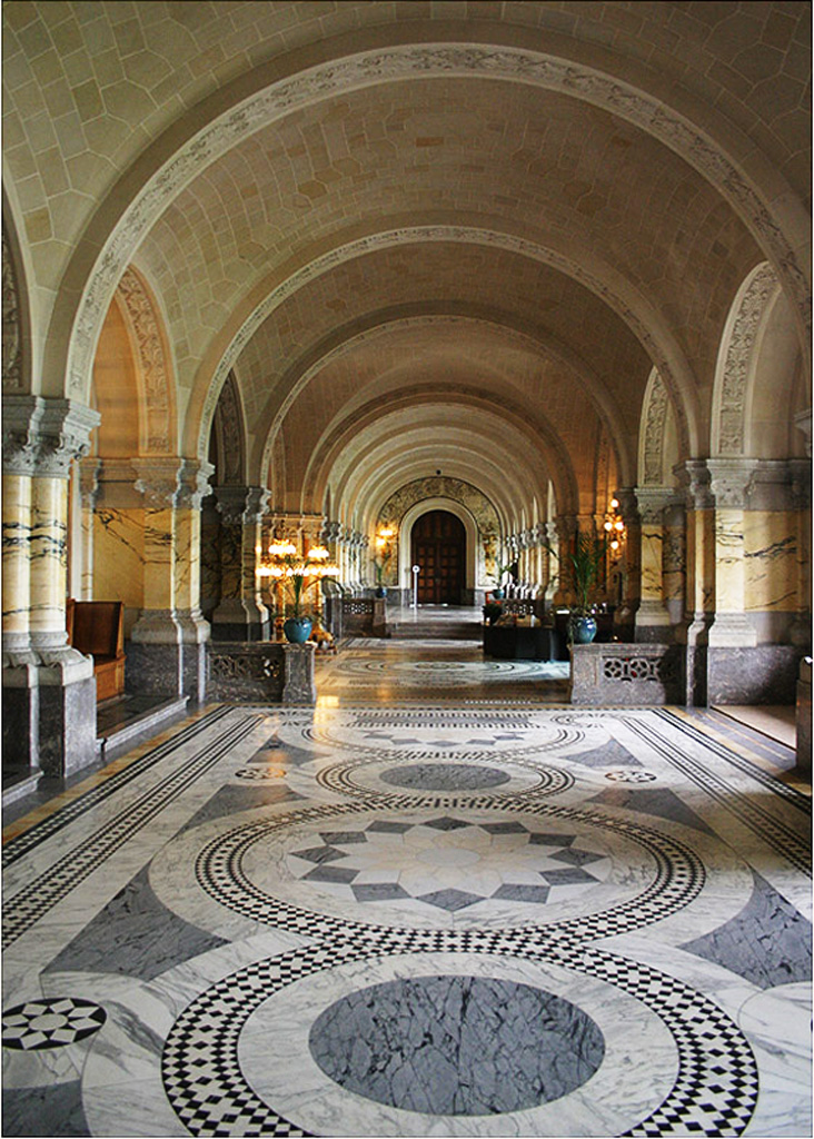 Le Hall d'entrée principale du Palais de la Paix. Au fond est la grande salle de Justice où siège la Cour internationale de Juste